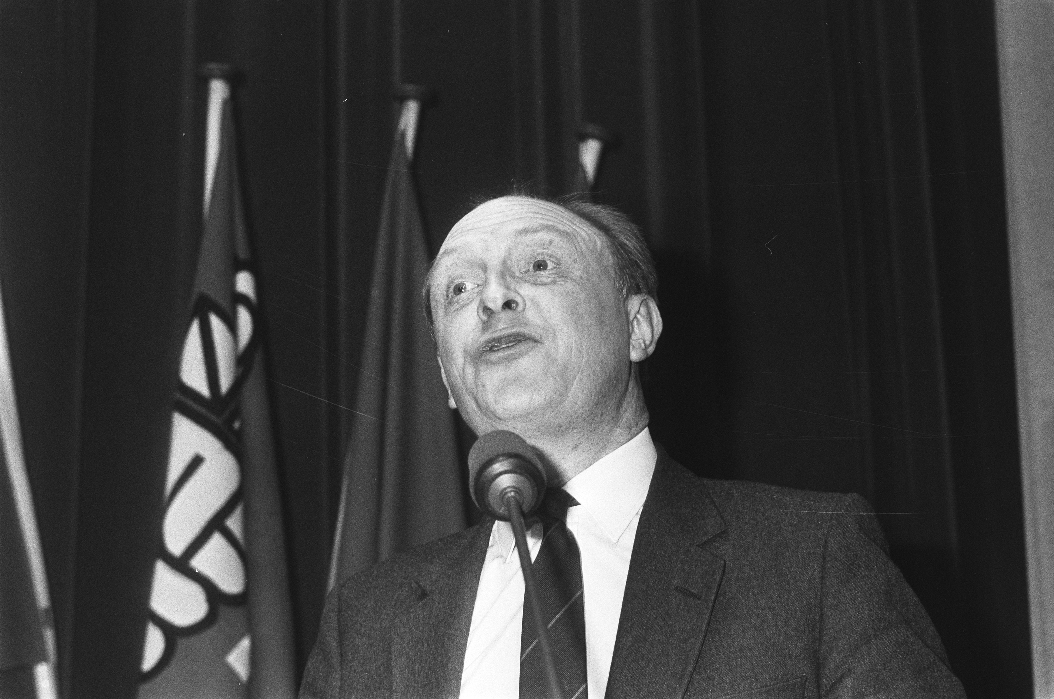 Collectie / Archief : Fotocollectie Anefo Reportage / Serie : Debat PvdA-verkiezingscongres RAI Beschrijving : Neil Kinnock (Labour, Groot-Brittannië) Datum : 14 februari 1986 Locatie : Amsterdam, Noord-Holland Trefwoorden : conferenties, politici, portretten Persoonsnaam : Kinnock, Neil Instellingsnaam : RAI Fotograaf : Gerritsen, Reinier, [onbekend] Auteursrechthebbende : Nationaal Archief Materiaalsoort : Negatief (zwart/wit) Nummer archiefinventaris : bekijk toegang 2.24.01.05 Bestanddeelnummer : 933-5685